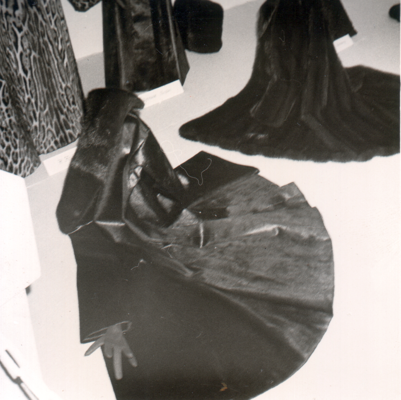 Leistungswettbewerb des Kürschnerhandwerks, Leistungsschau, anlässlich der Pelzmesse in Frankfurt am Main. Ariranha-Otter-Mantel